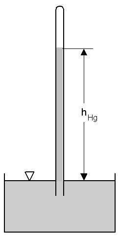 Luftdruckmessung, Prinzip von Torricelli